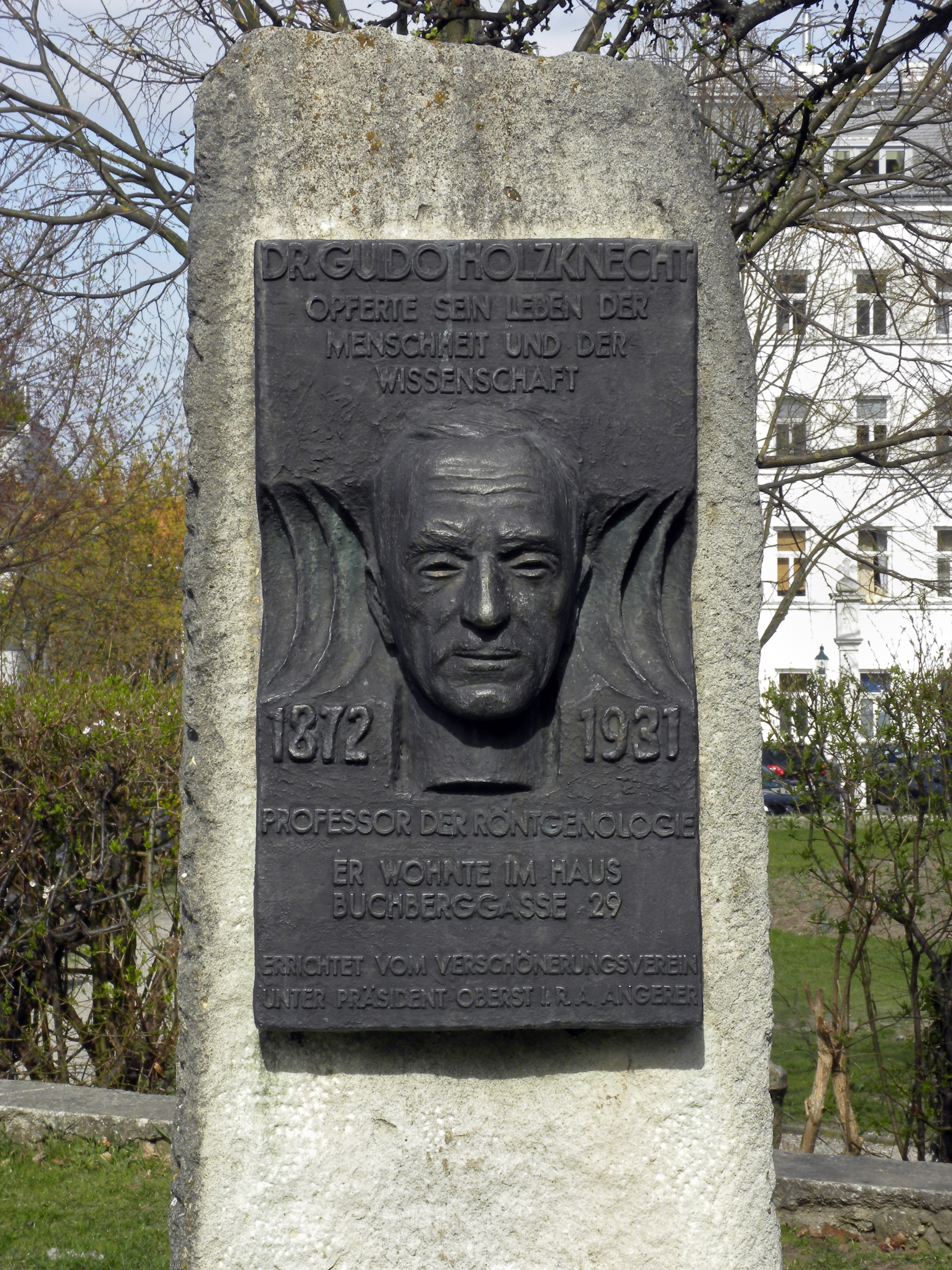 Denkmal für Dr. Guido Holzknecht in Klosterneuburg am Kardinal Piffl-Platz